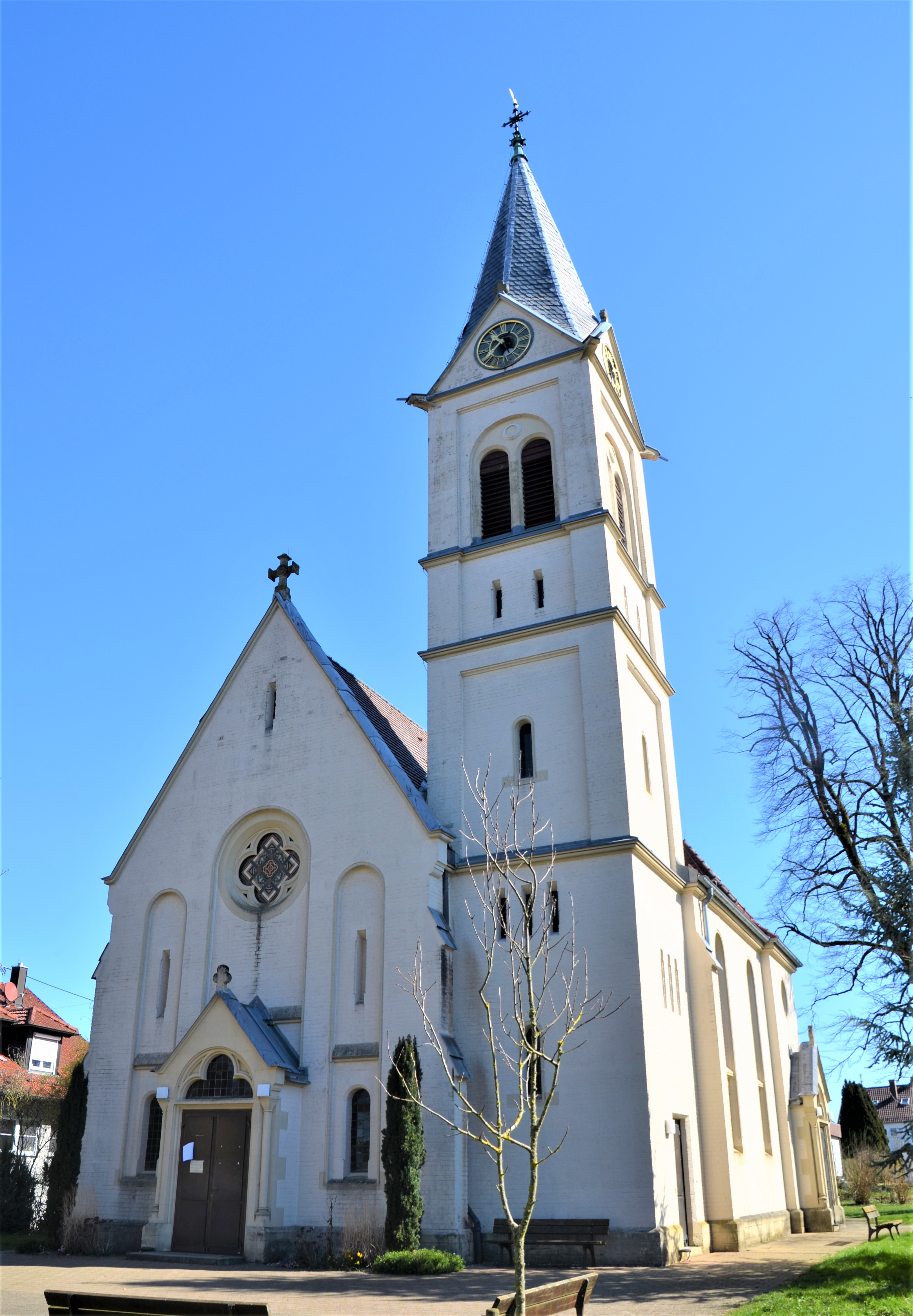 Evangelische Kirche von Westen